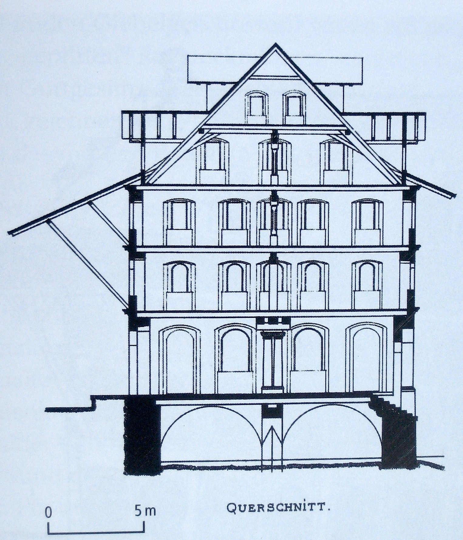 Querschnitt durch das Kornhaus. Zeichnung von Hans Roth, 1891